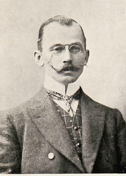 Guillermo Beckert canciller de la Legación Alemana en Chile.